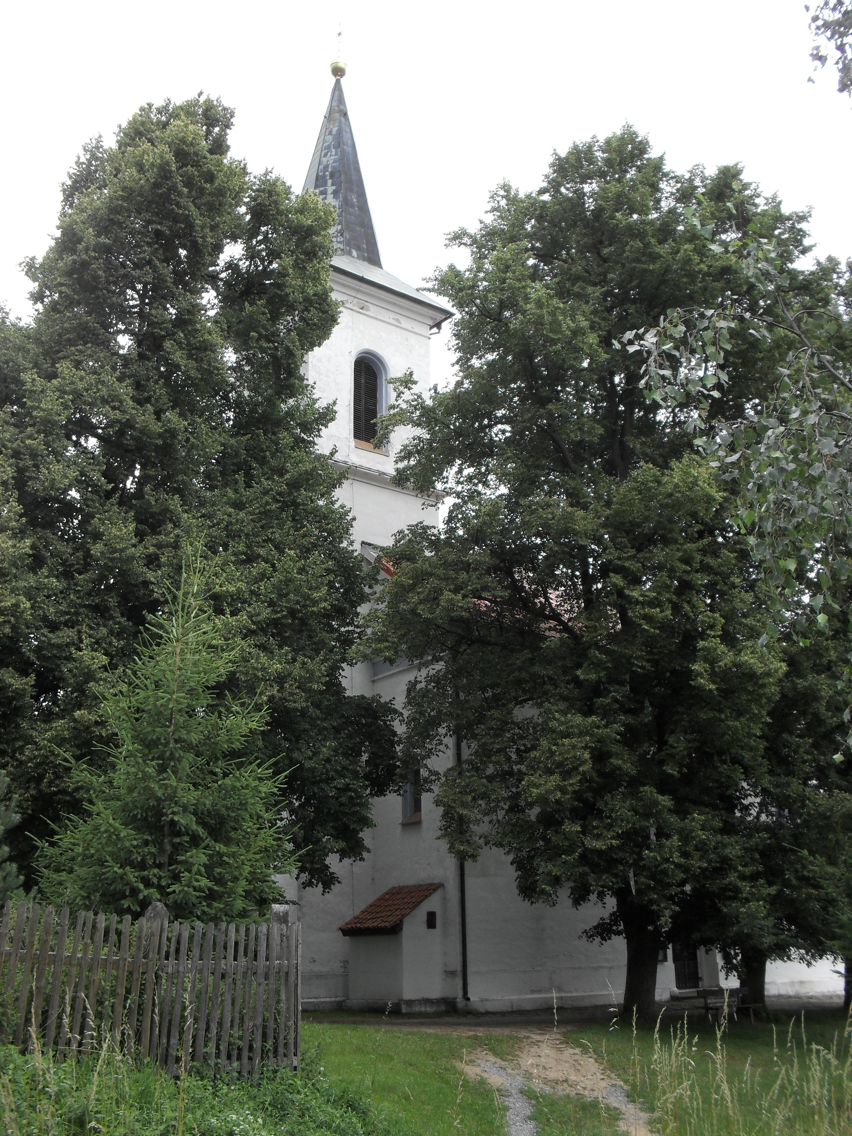 Fotografie z obce Pačejov